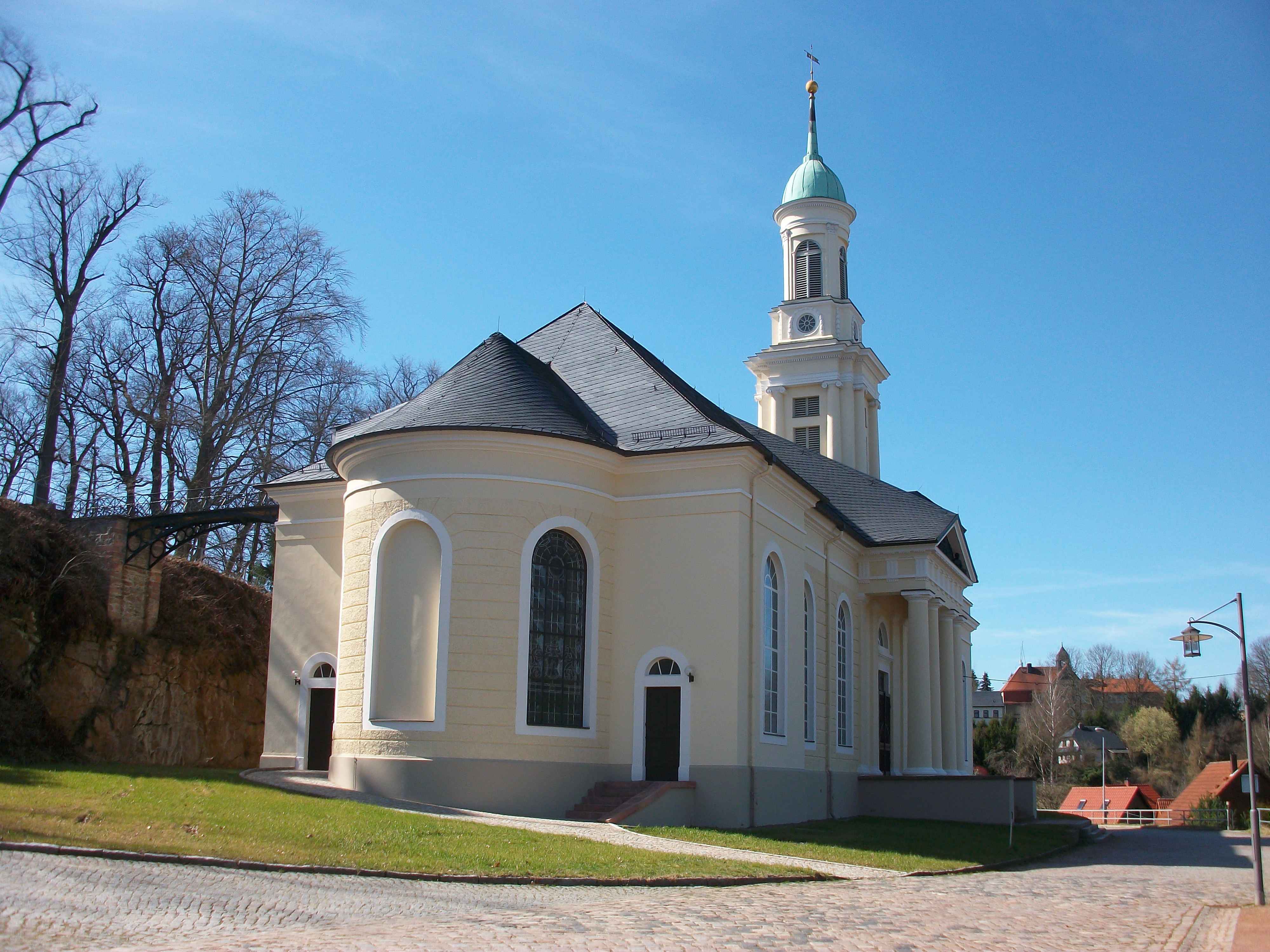 St. Mauritiuskirche, Rüchansicht